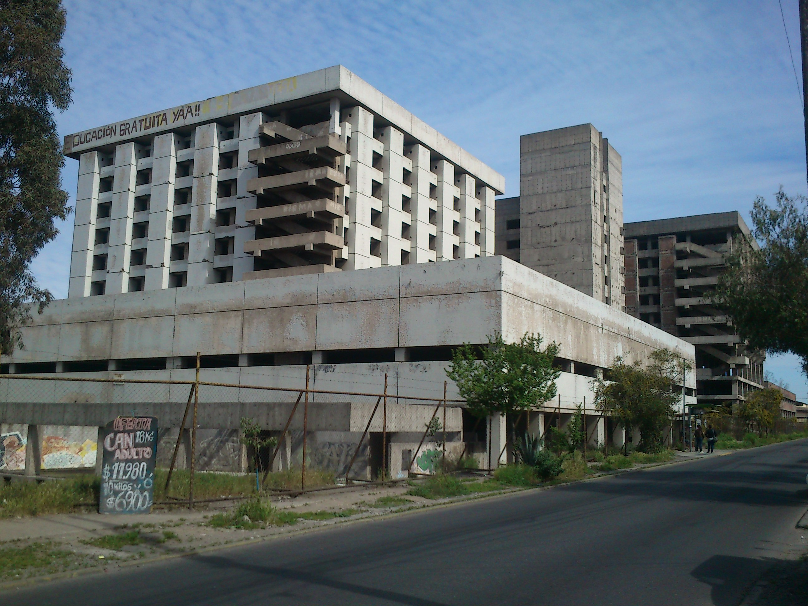 Hospital público inconcluso en Pedro Aguirre Cerda, Santiago de Chile.